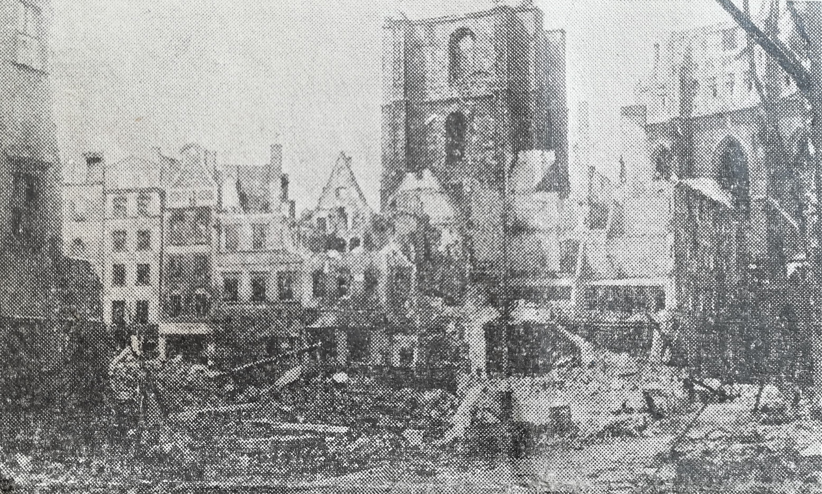 Rynek w Nysie po zniszczeniach IIWŚ.